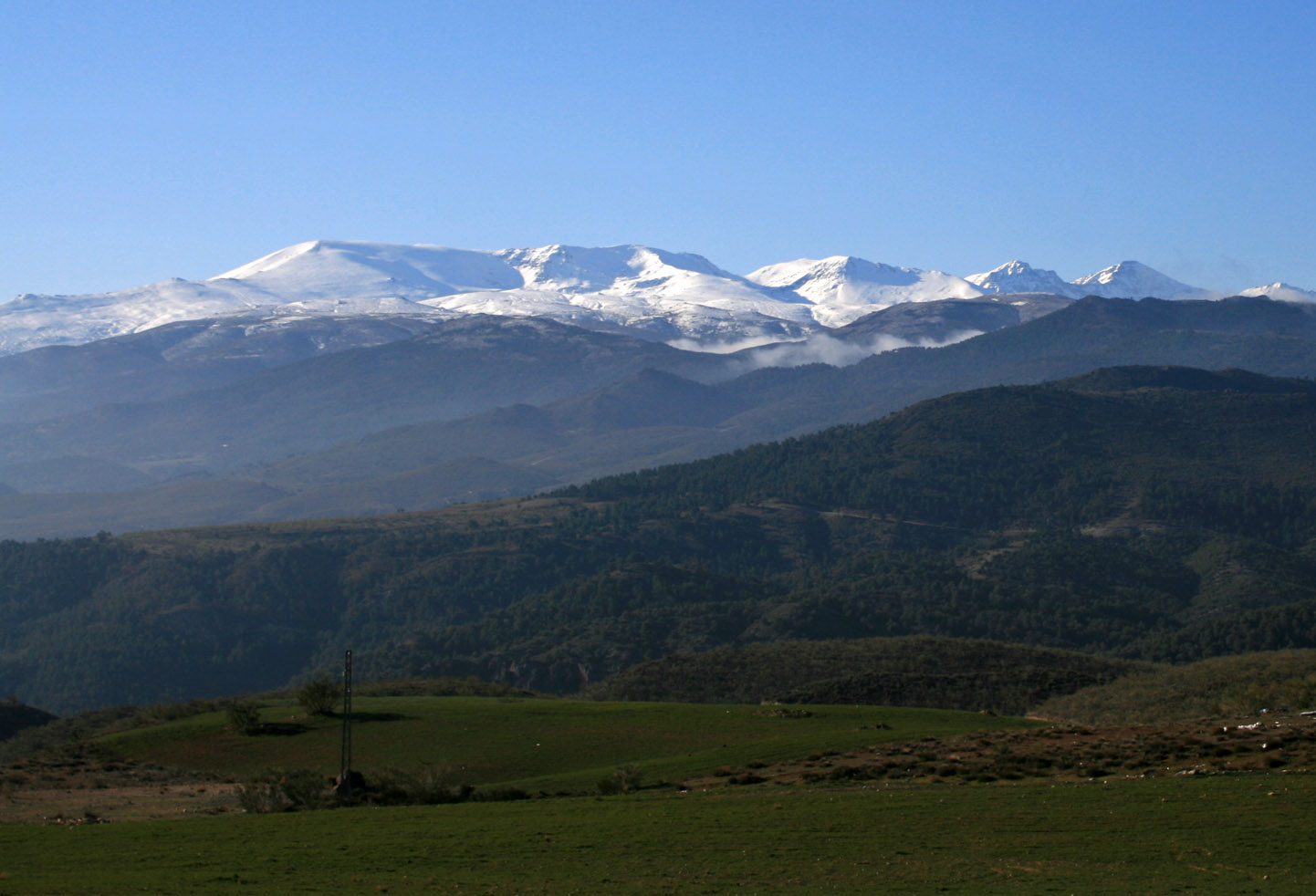 Sierra Nevada vista desde Diezma, en Granada (España)